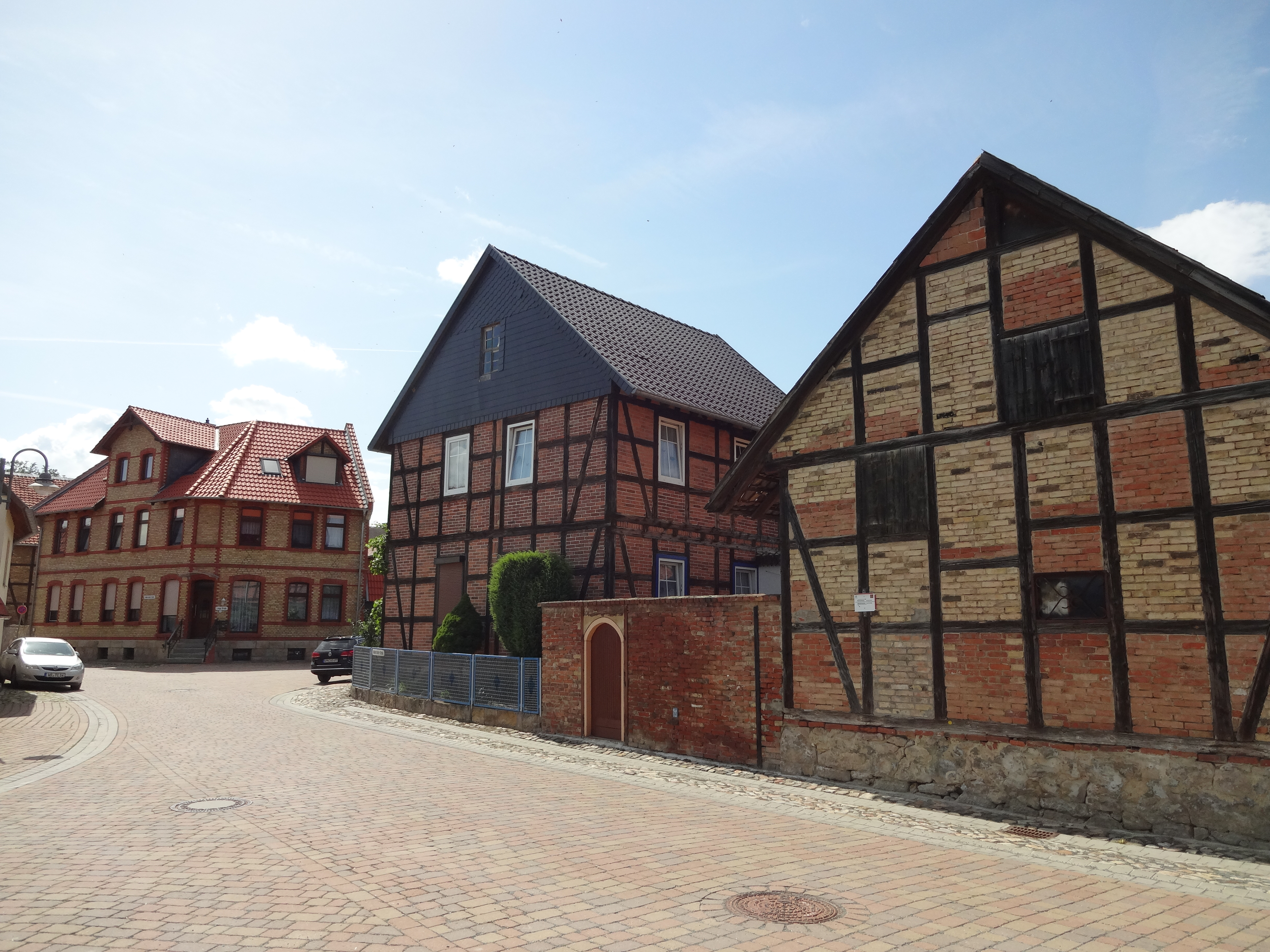 Lange Straße 1 und 24; Teil des ehemaligen Denkmalensemble Häusergruppe Halberstädter Straße1/Lange Straße 1 und 24 in Börnecke, Ortsteil von Blankenburg/Harz